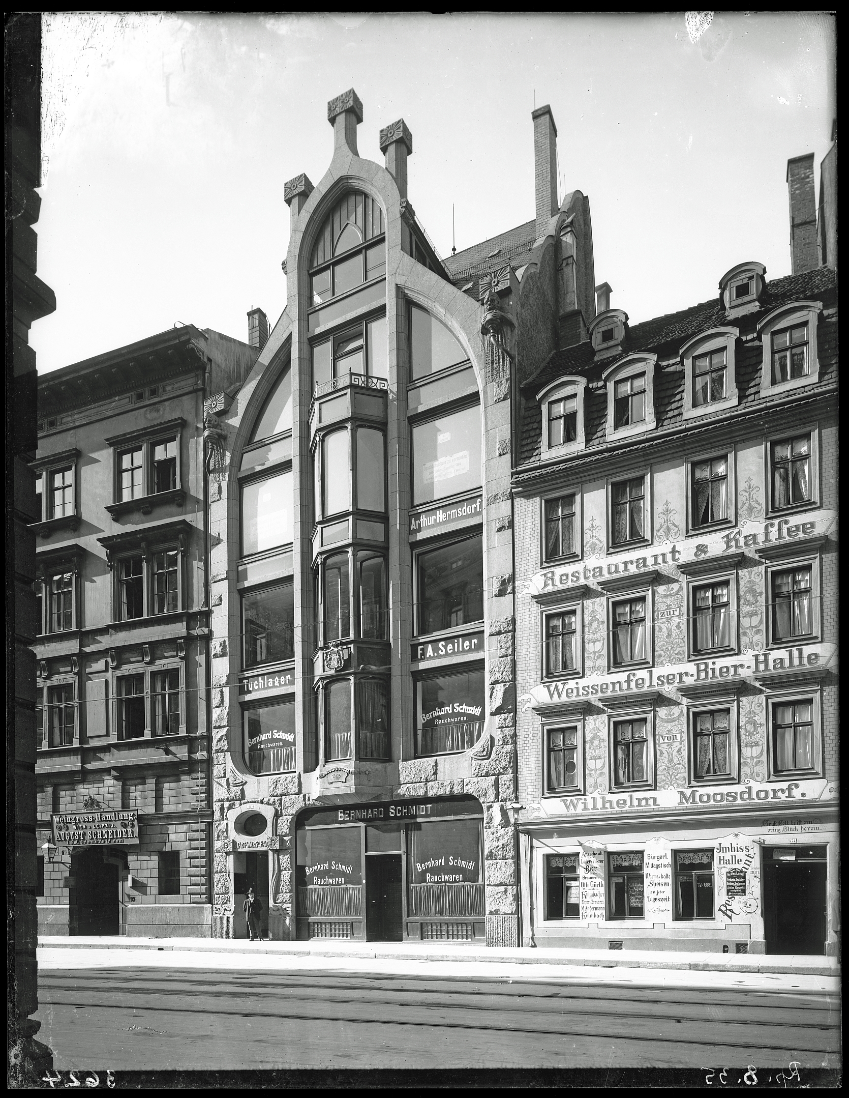 Das Geschäftshaus Stadt Warschau in Leipzig Brühl 76/78, nach 1903. Weingrosshandlung August Schneider, Wien & Leipzig Bernhard Schmidt Rauchwaren F. A. Seiler Tuchwaren Arthur Hermsdorf (Rauchwarenhandlung) Wilhelm Moosdorf Restaurant und Cafe Weissenfelser-Bier-Halle Imbisshalle